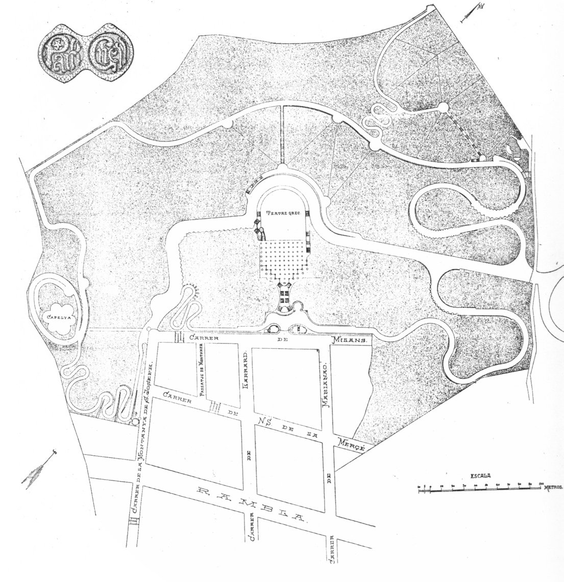 Plano del Parque Güell, de Antoni Gaudí, publicado en el Anuario de la Asociación de Arquitectos de Cataluña (Barcelona), en 1903.